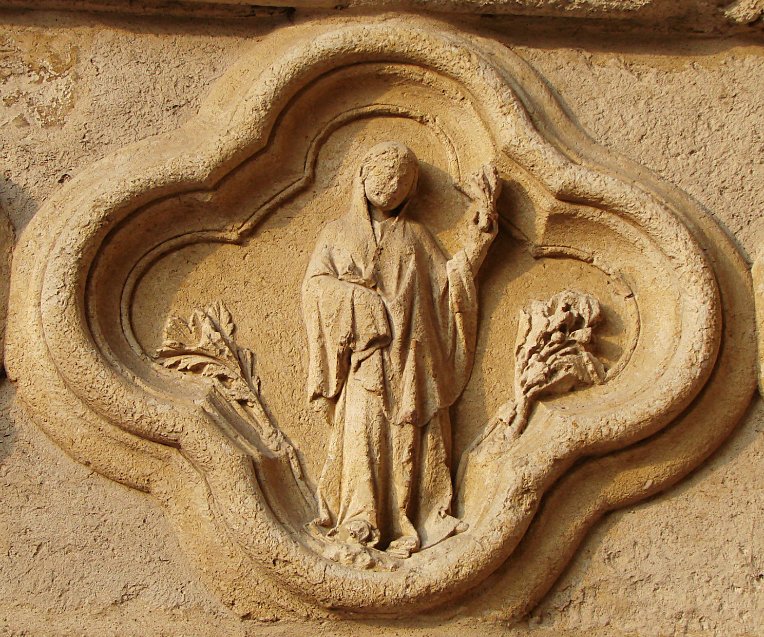 La vierge (Virgo) ;un des signes du zodiaque complet figurant sur le portail gauche de la façade de la cathédrale d'Amiens.